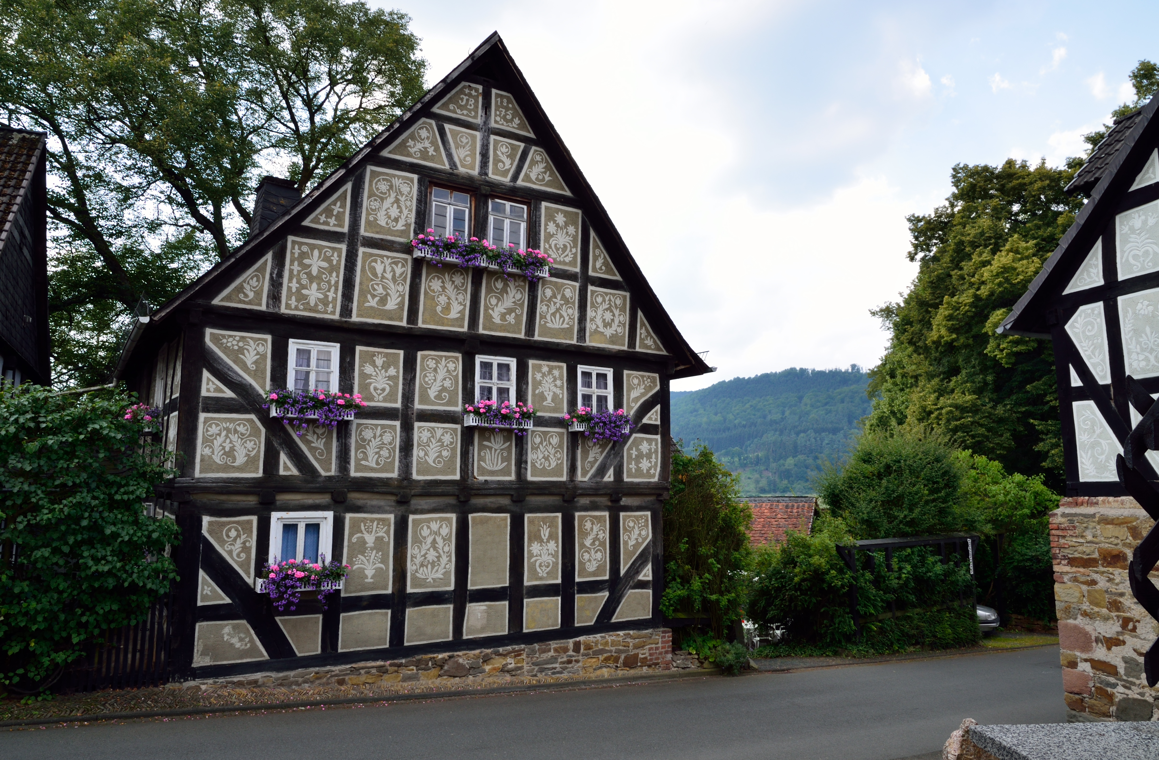 Fachwerkfassade des Schartenhofs in Eckelshausen mit Kratzputz; Inschrift am Giebel: „JB 1875“